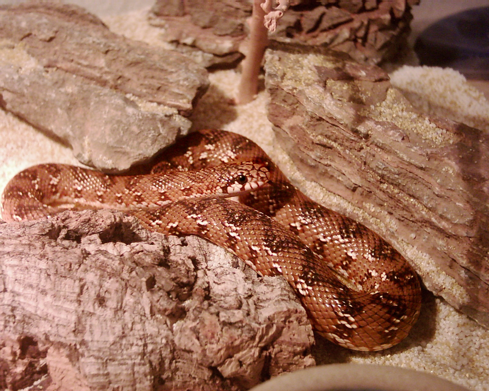 Subadulte Maulwurfsnatter (Pseudaspis cana) beim Sonnenbad